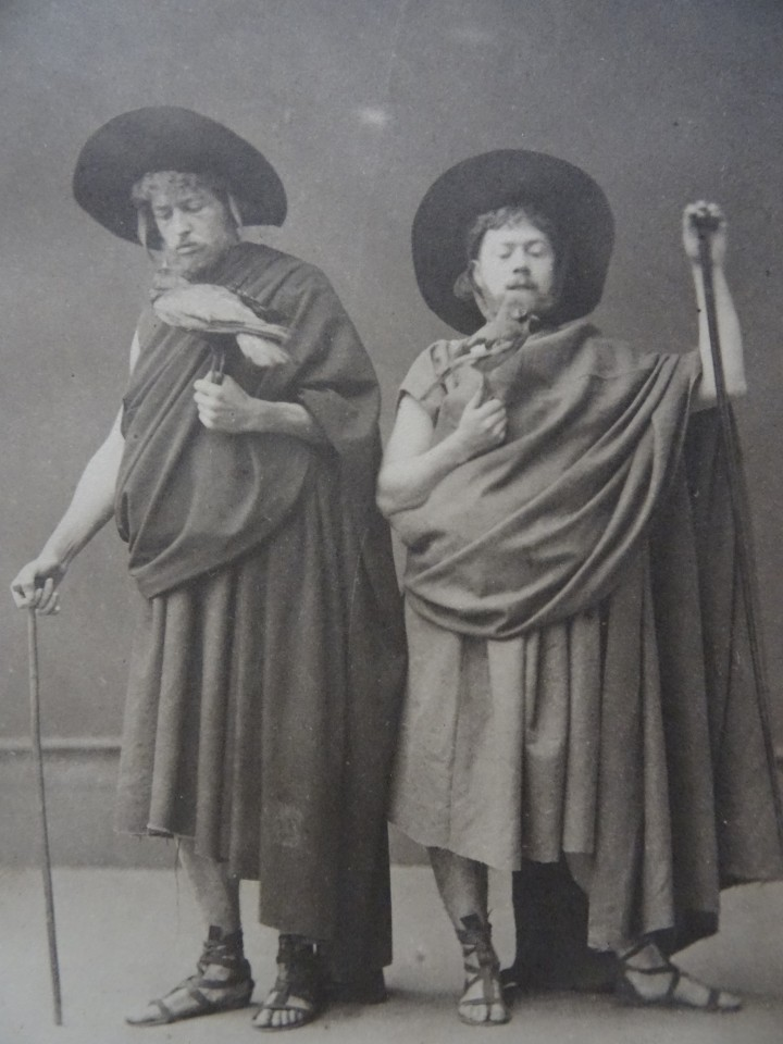 Peithetairos and Euelpides